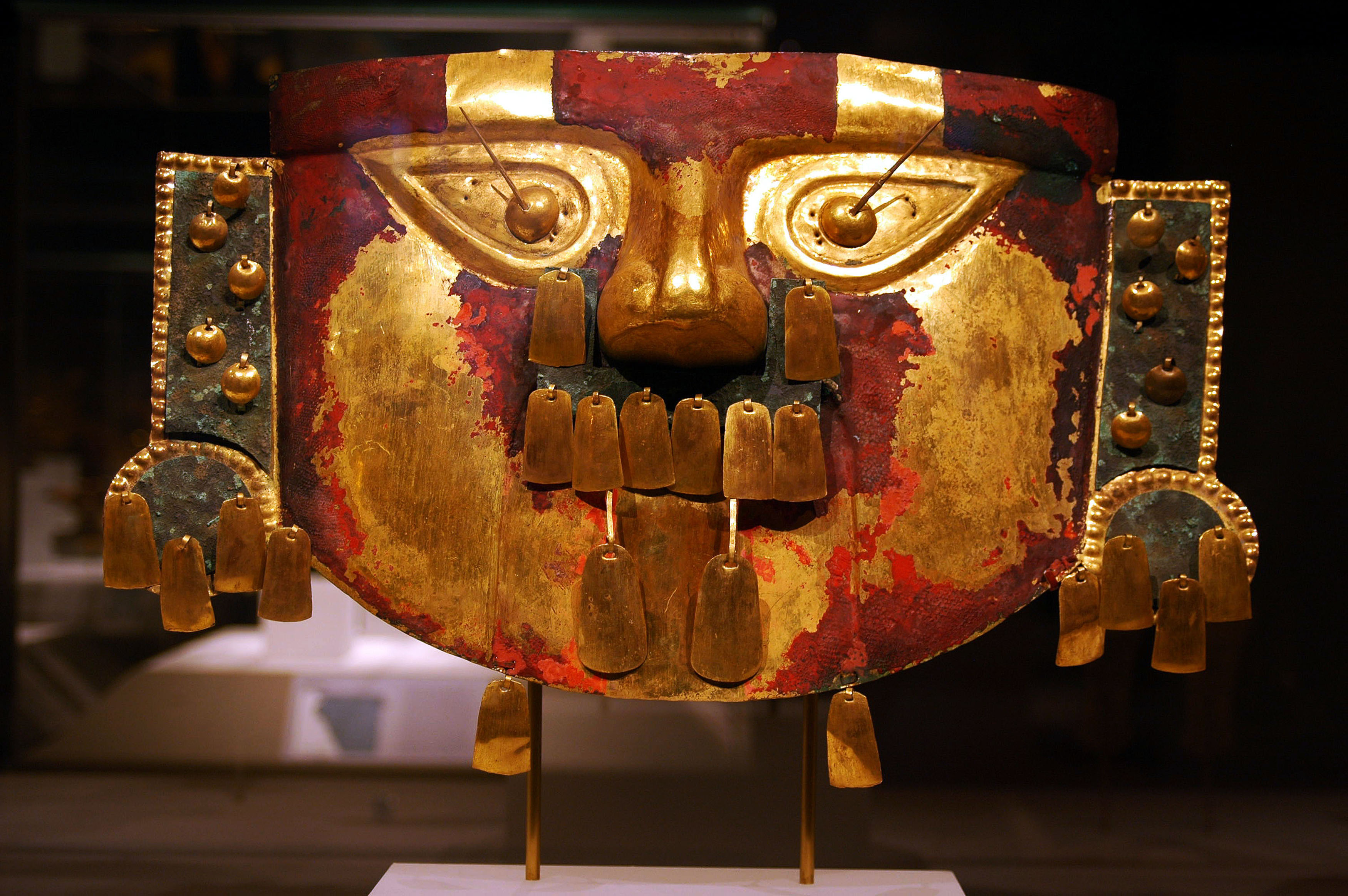 Mascara lambayeque ( museo de Sican)